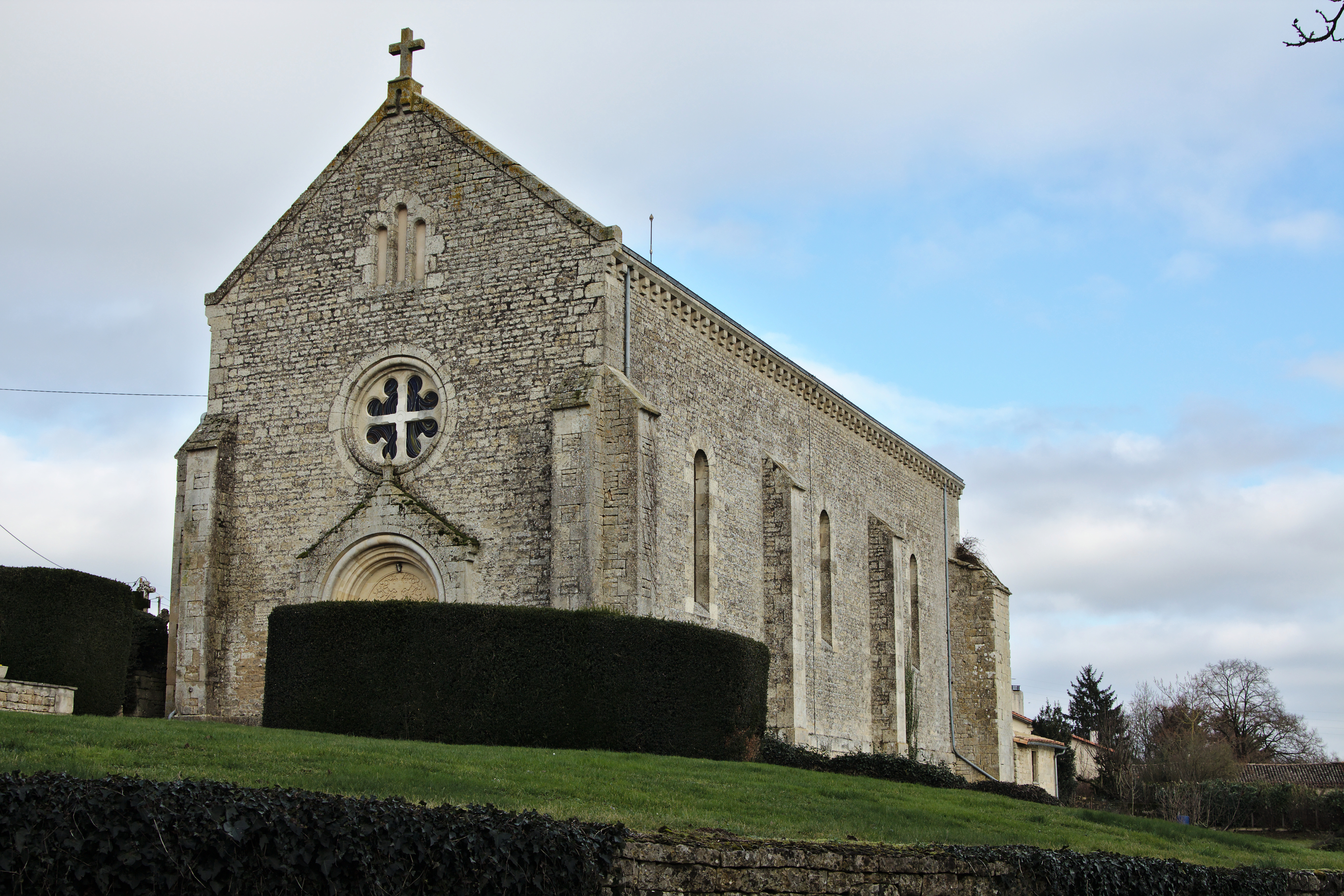 Prieuré de bénédictins Saint-Pierre-ès-Liens, Paizay-le-Tort